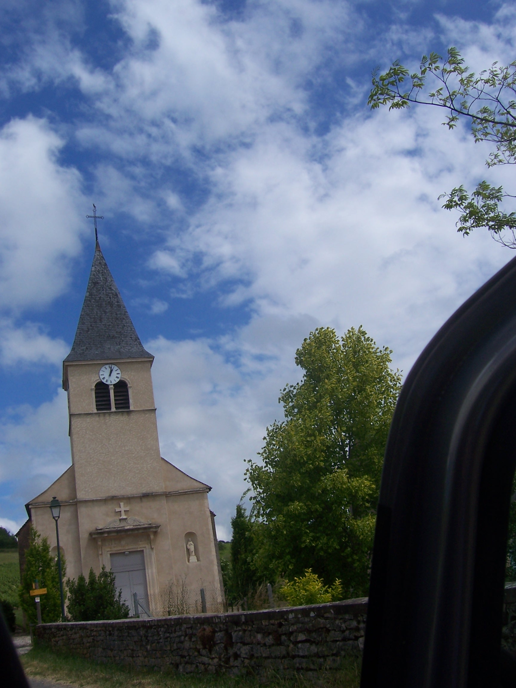 Eglise de Martailly-lès-Brancion